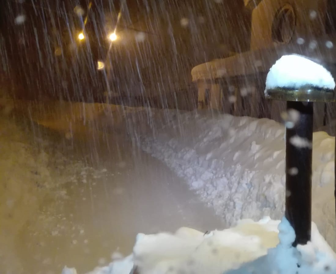 Chiesa di S. Nicola durante una bufera nel nevone 2017